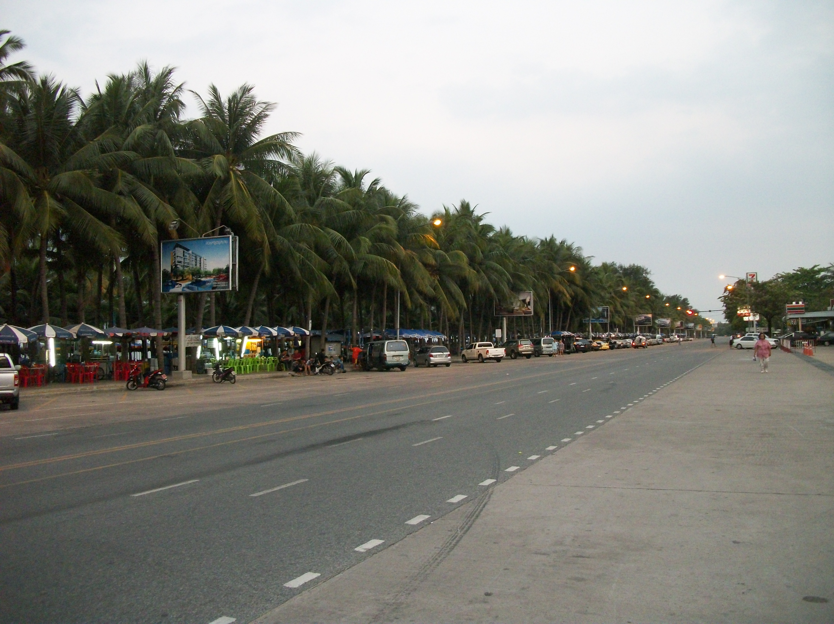 ถนนบางแสนสาย1 Bang-saen sai1 road